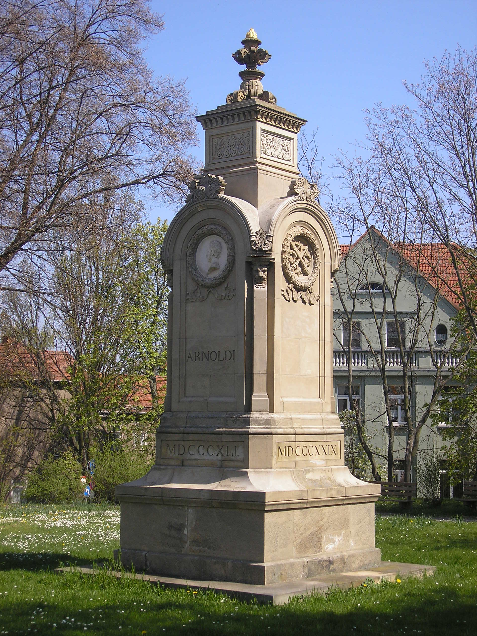 Das Arnoldi-Denkmal in Gotha (Thüringen).